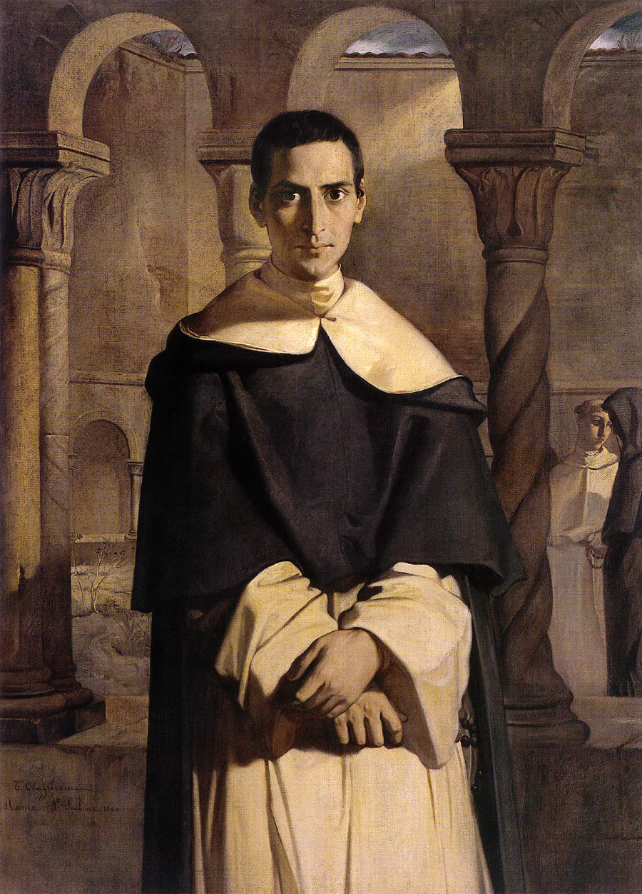 Le Révérend Père Dominique Lacordaire, de l'ordre des frères Prêcheurs (1802-1856)